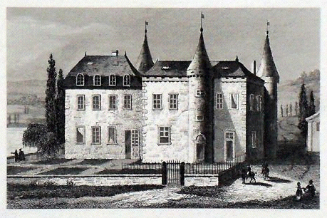 Château de Sourniac, Sourniac, Cantal, France